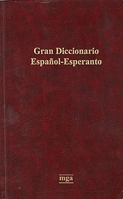 Foto farita de Luis Guillermo Restrepo Rivas, kiun la aŭtoro liveras por publika kaj libera uzado far iu ajn homo aŭ maŝino.